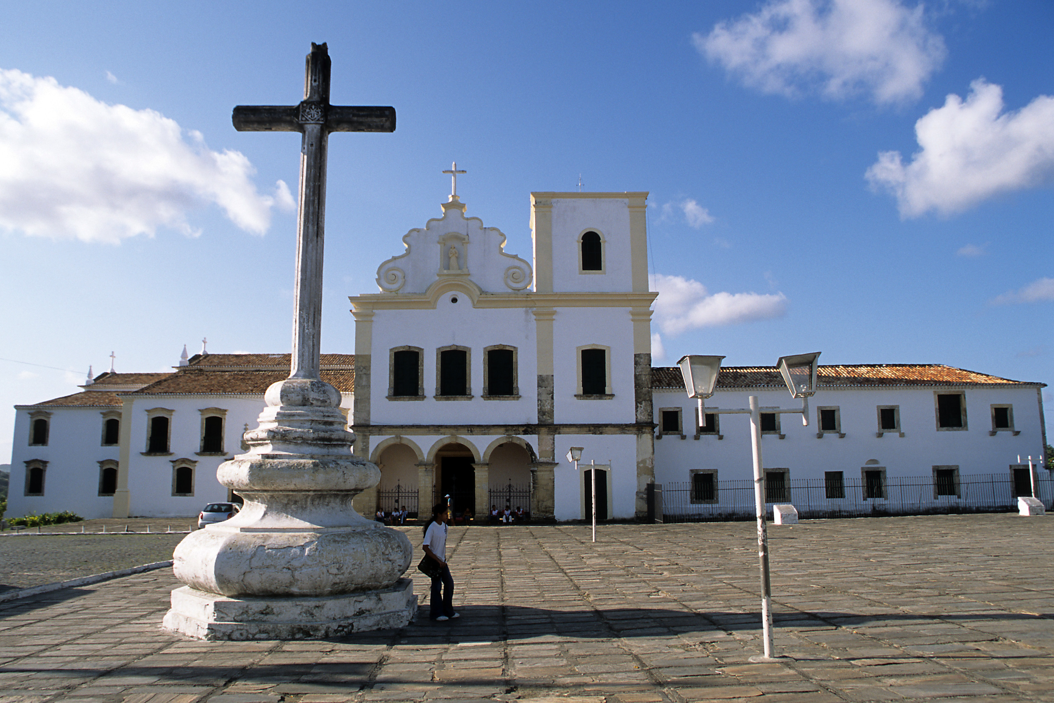 Crédito: Anderson Schneider/IPHAN